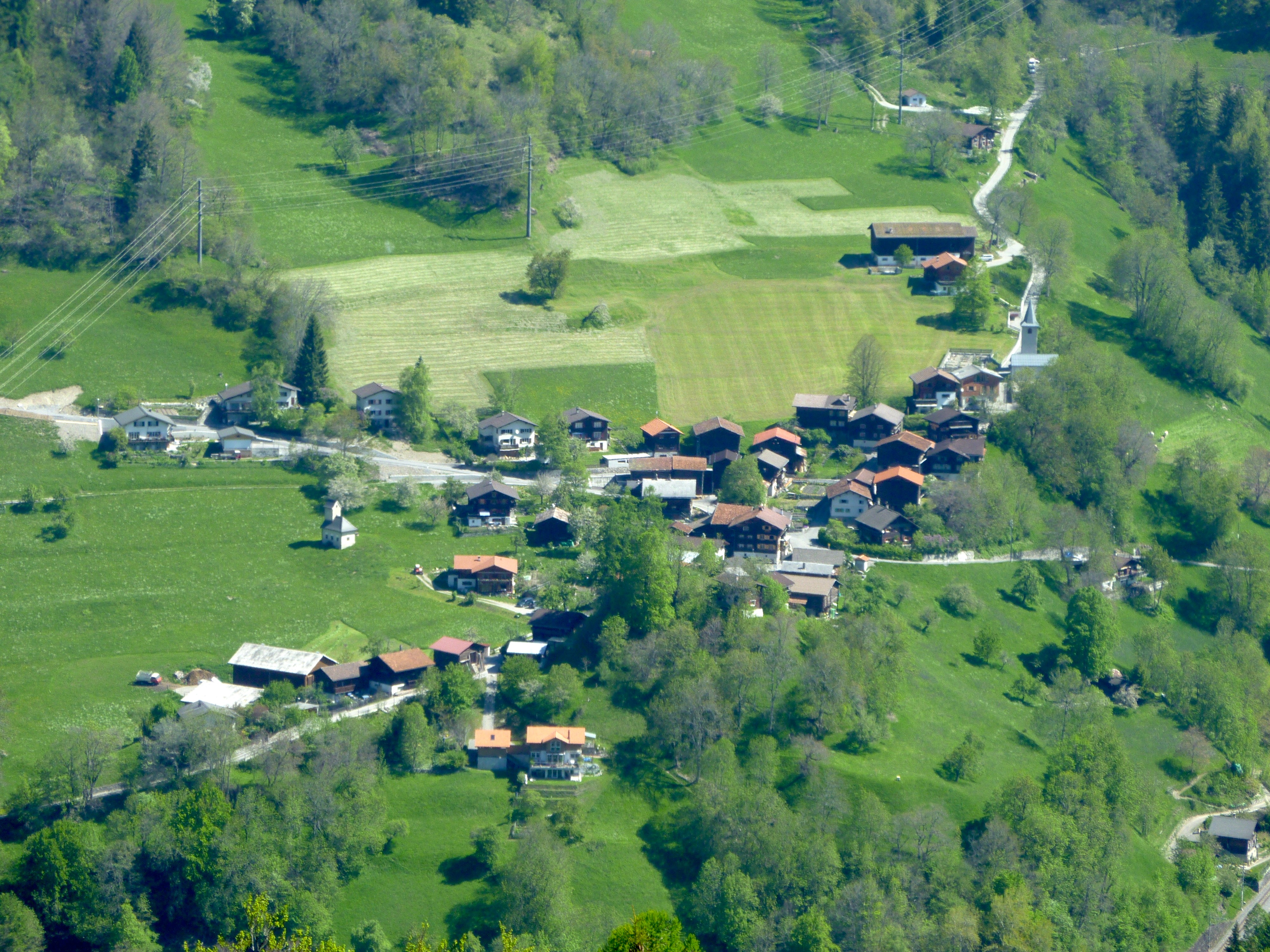 Lüen